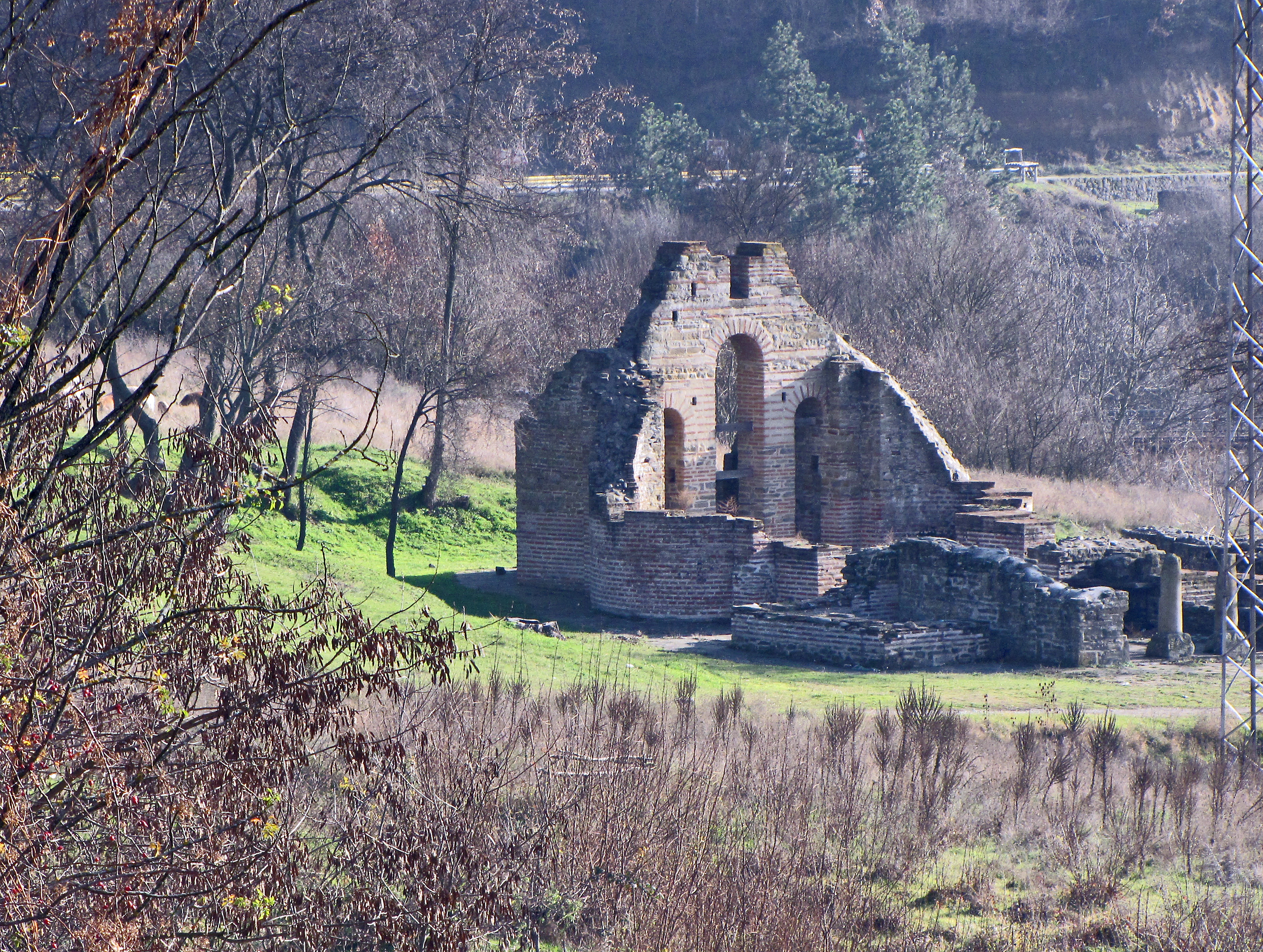 Манастири Свете Богородице и Светог Николе су прве задужбине Стефана Немање, у време када је у данашњој Куршумлији, тадашњој Топлици био и његов двор, - Извесно време Куршумлија се звала Беле цркве, по белим, сјајним, оловним крововима ових светиња, - У манастиру Свете Богородице, се замонашила Немањина жена Ана, као монахиња Анастасија, - У овом манастиру боравиле су султанија-царица Мара и Мирослава Балшић, као монахиња Агрипина, - Од Манастира Свете Богородице данас постоје само остаци зидова.